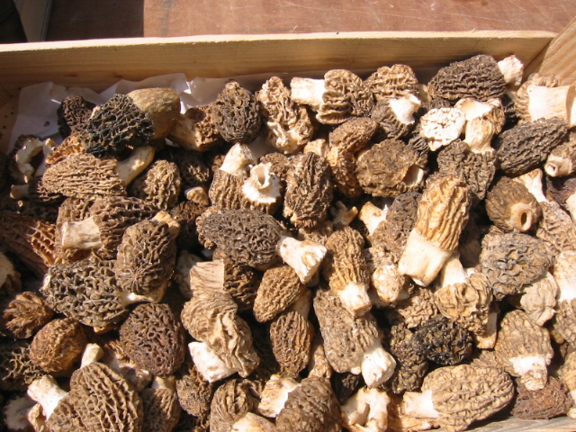 Morilles